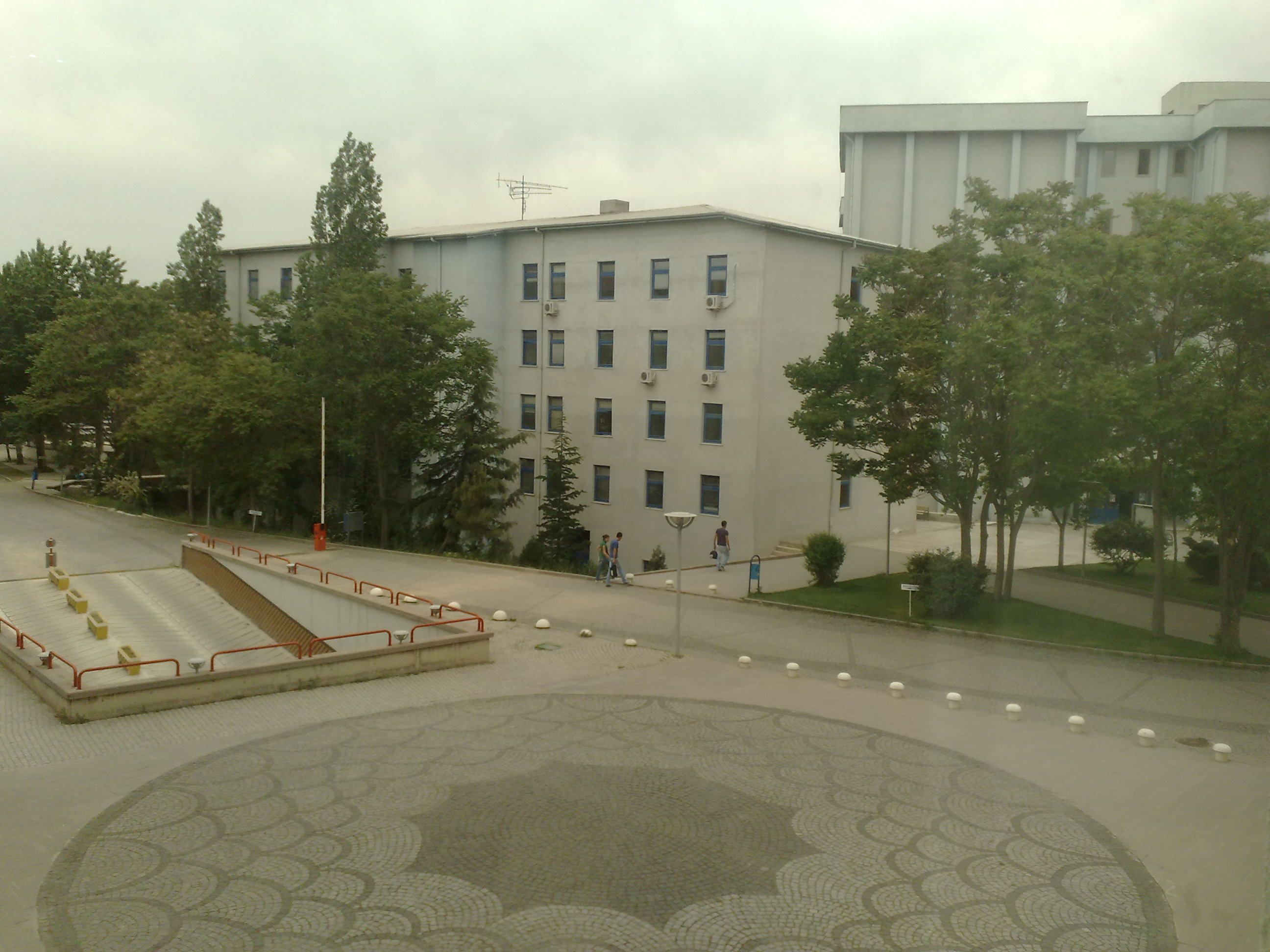 Gazi Üniversitesi'nden bir görüntü.